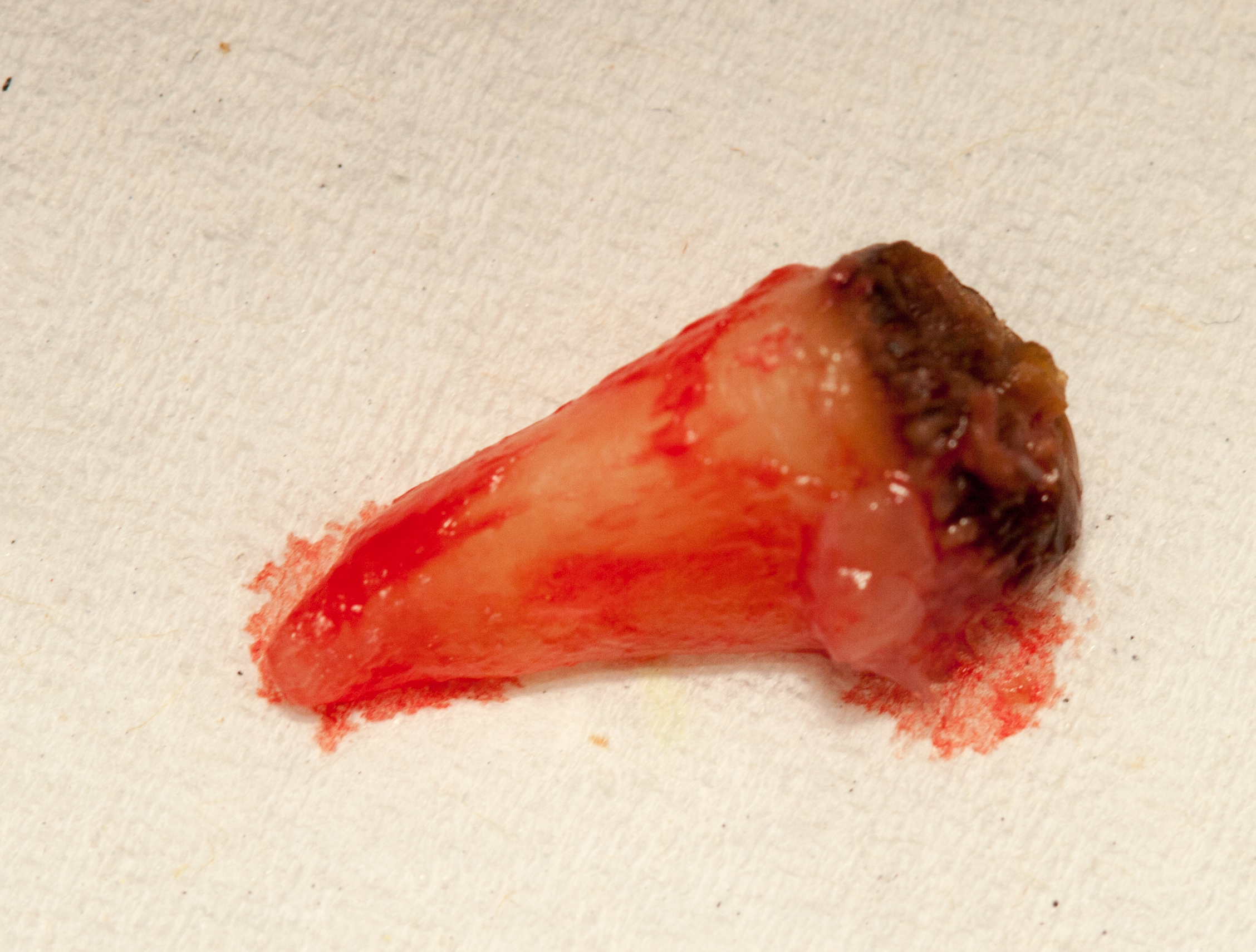 extrahierter Zahn mit apikalem Granulom (vielleicht auch mit apikaler Zyste) - das lässt sich ohne Histologie nicht genau sagen